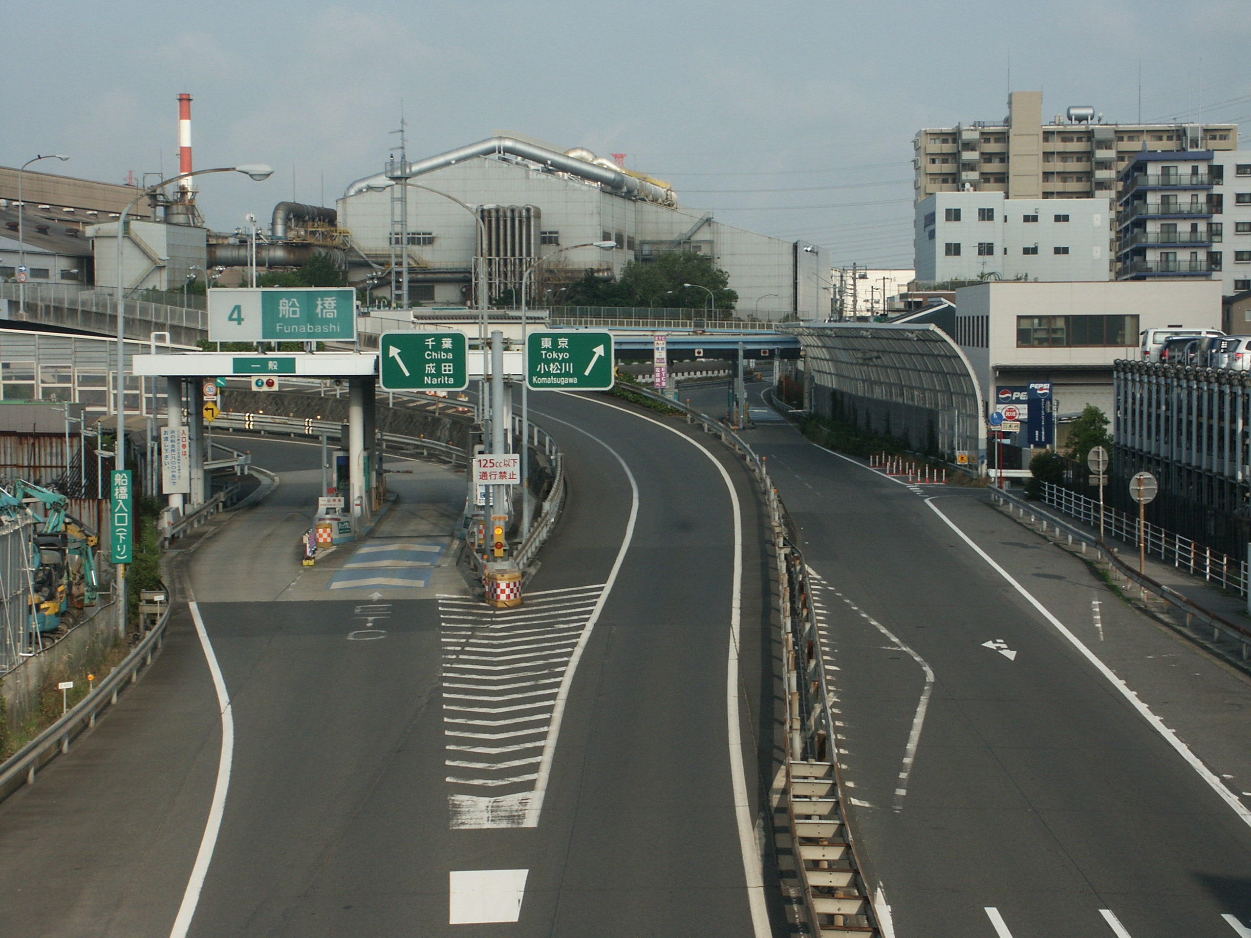 京葉道路船橋IC料金所